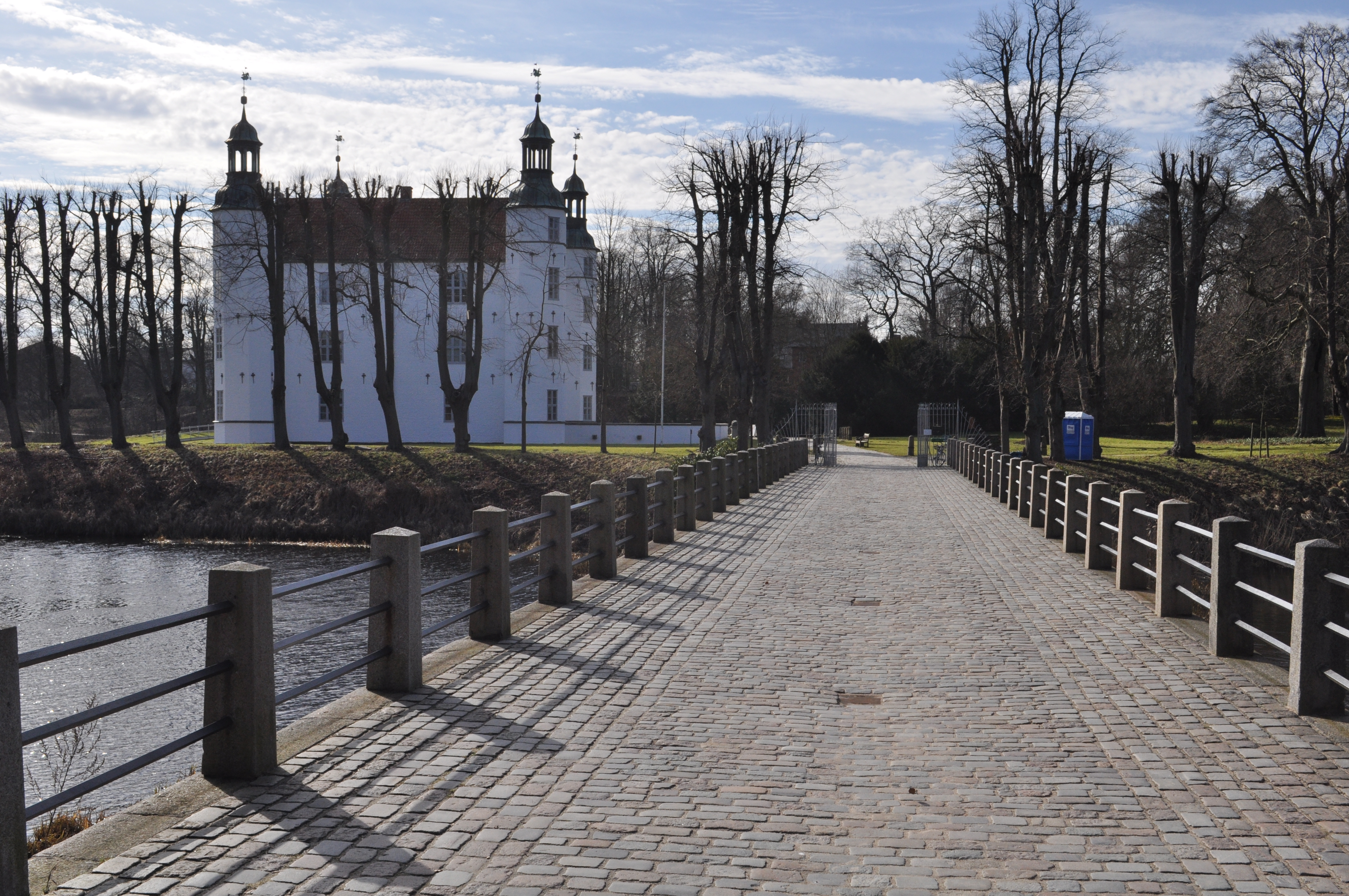 Brücke zur Schlossinsel, im Hintergrund das Ahrensburger Schloss This is a photograph of an architectural monument. .5